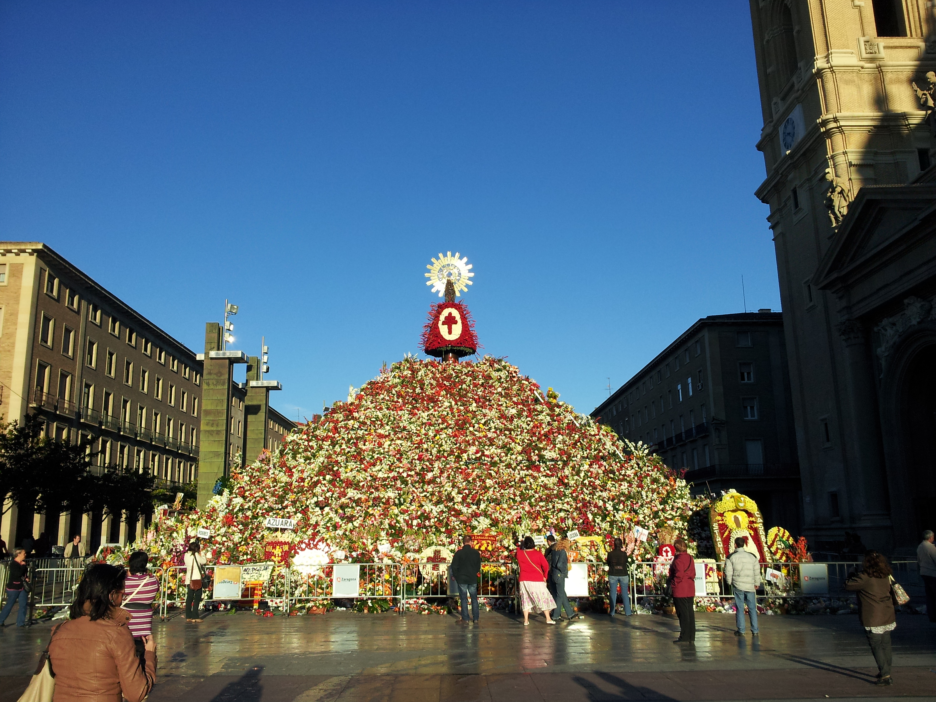 Iglesia Magistral de Nuestra Señora del Pilar